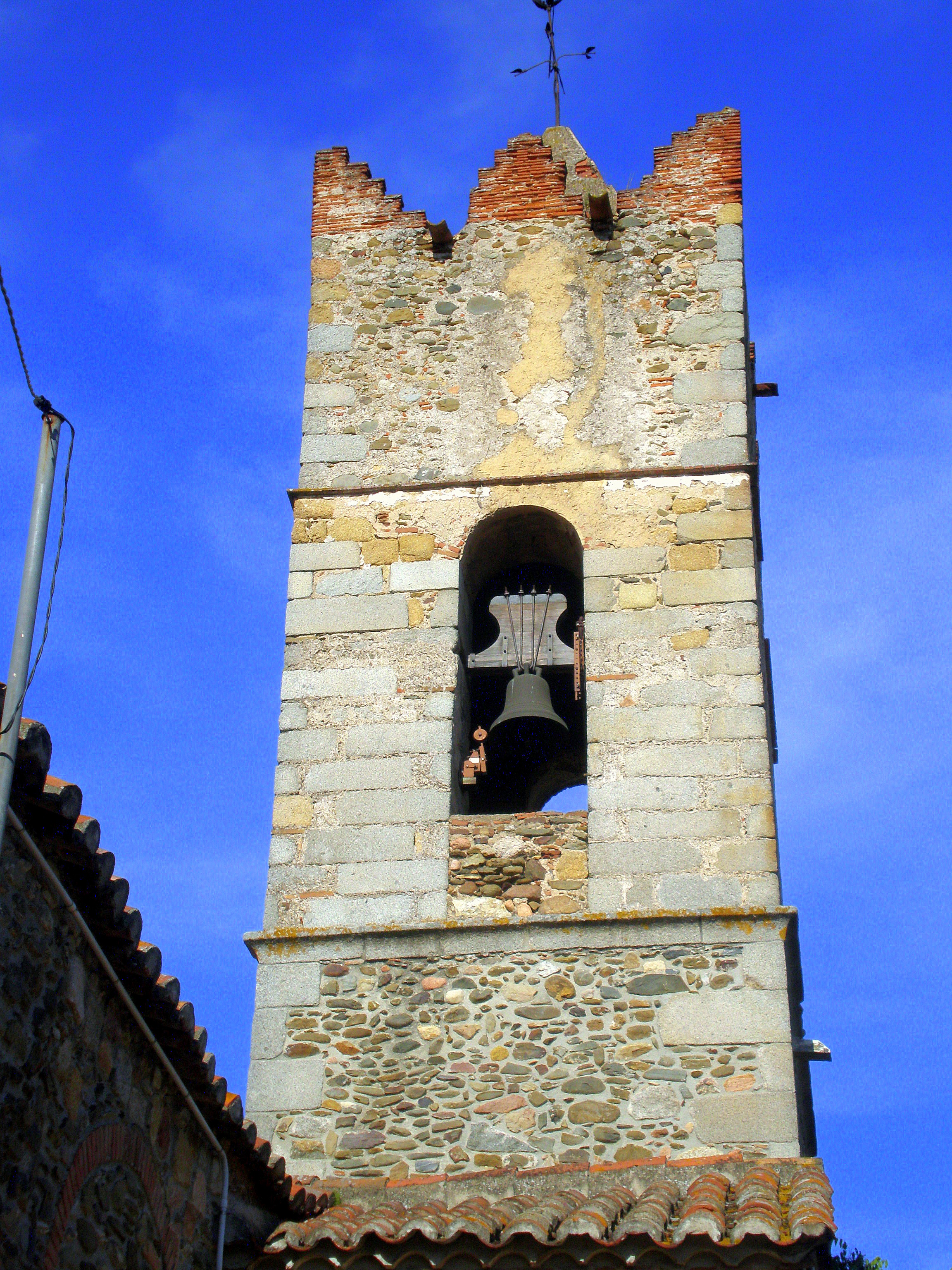 Sant Julià d´Alfou